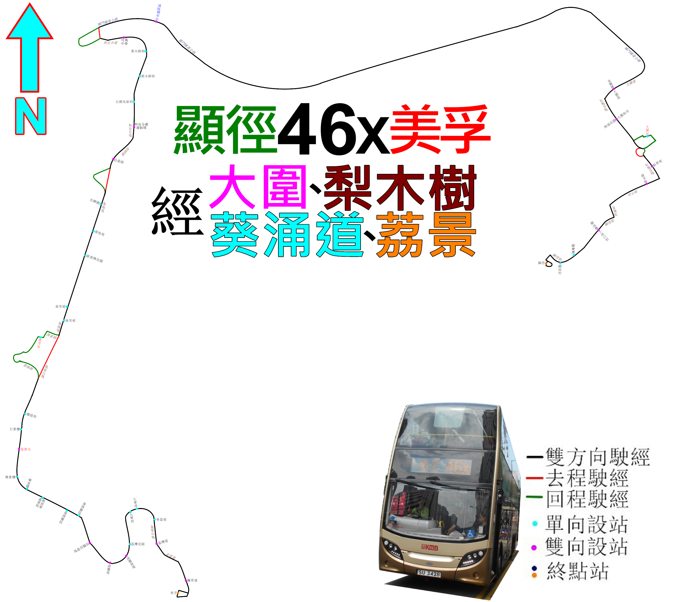 中文（香港）: 九巴46X線的走線圖